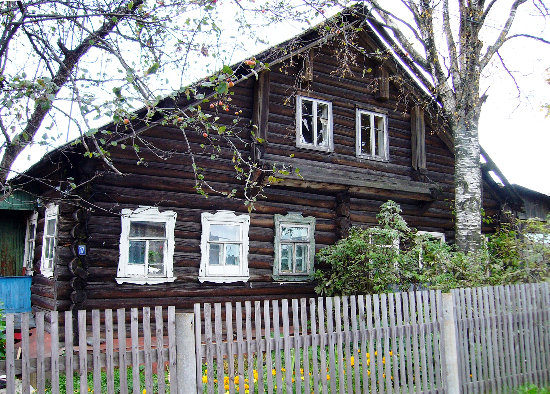 Дом Аверкиных. Фрагмент. Петрозаводск, улица Шуйская, дом 17. Сентябрь 2012 года. Дом в Сулажгоре. Жилой.